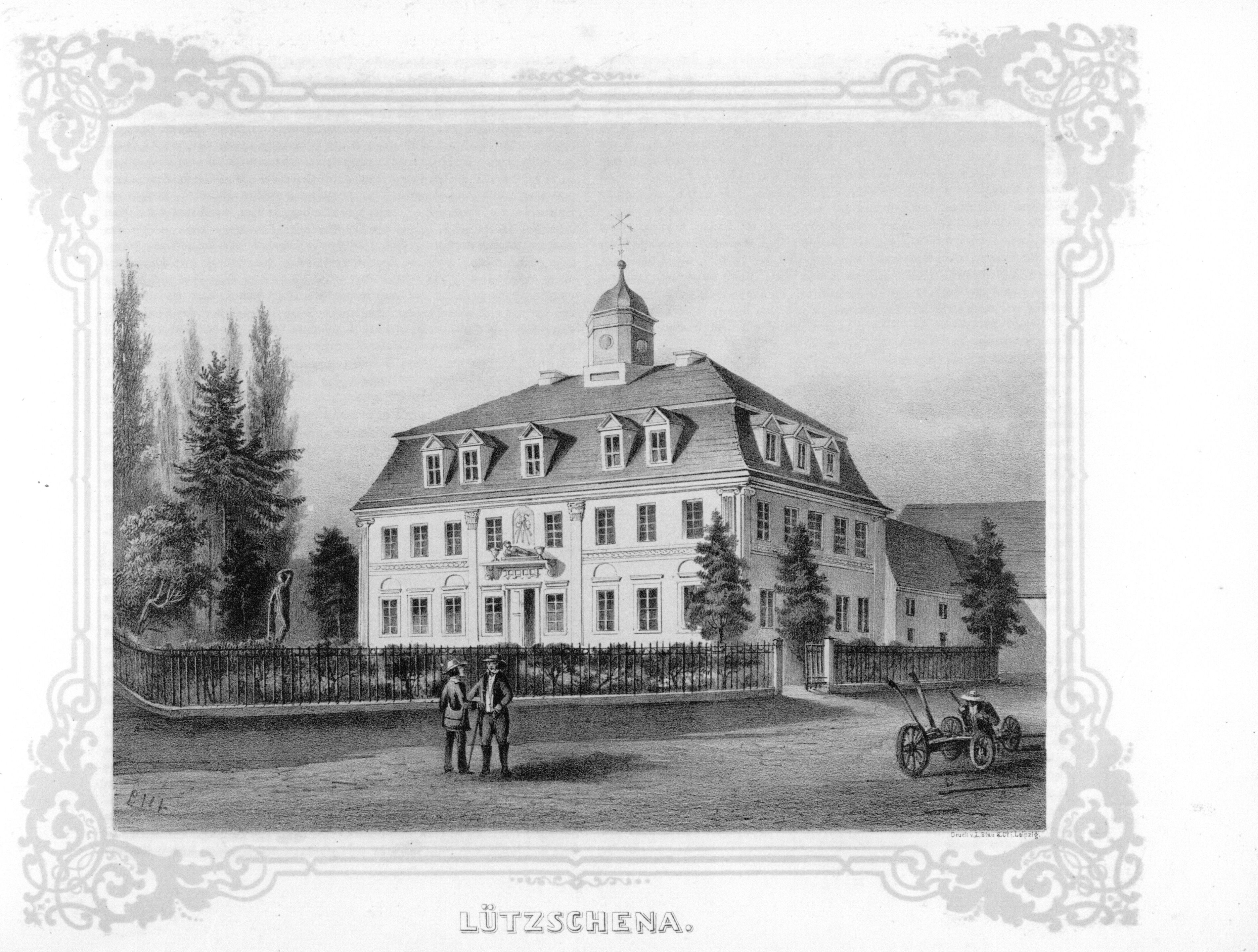 Lützschena aus: Album der Rittergüter und Schlösser im Königreiche Sachsen Leipziger Kreis Section: I